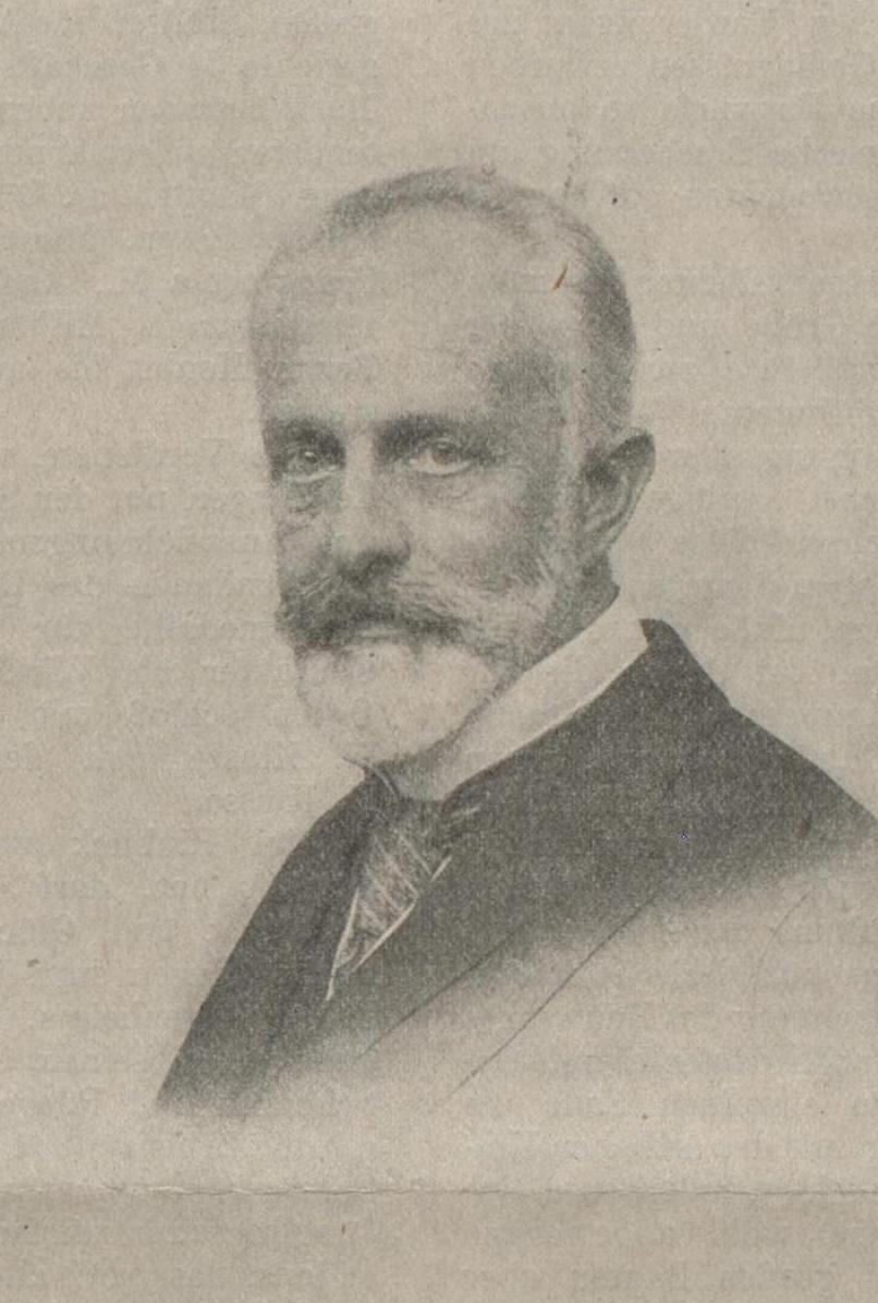 Porträt-Foto von Paul Thoemer